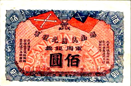 The paper money of Vietnam Restoration Army, used since 1912 to 1925.